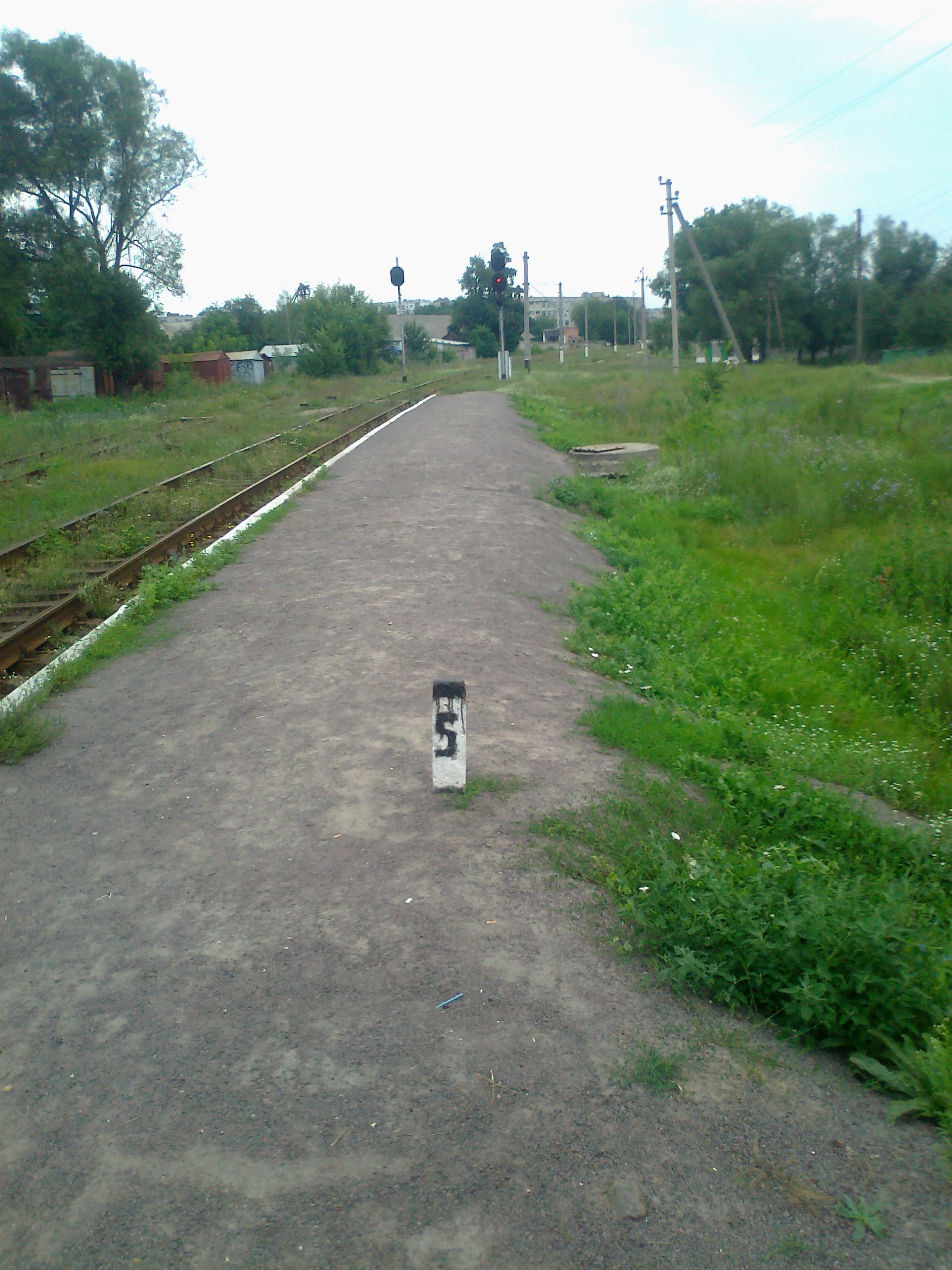 Залізнична платформа Хіміків, м. Шостка, Сумська область, Україна